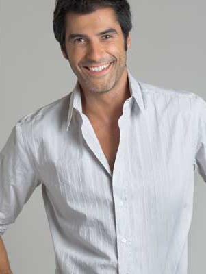 Jorge Fernández, Míster España 1999 y presentador de televisión.